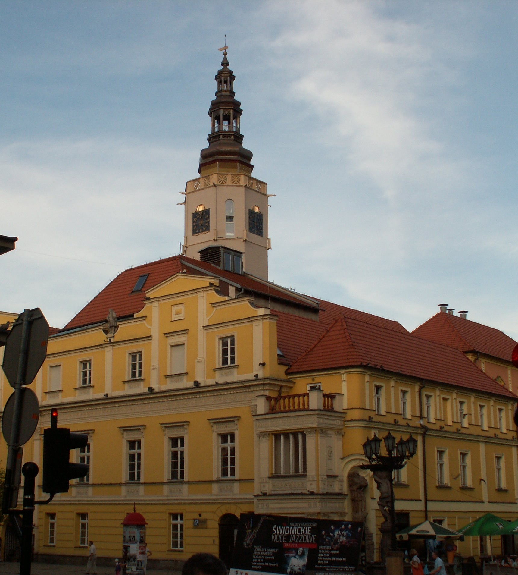 Ratusz w Świdnicy z odbudowaną wieżą, 29.04.2012